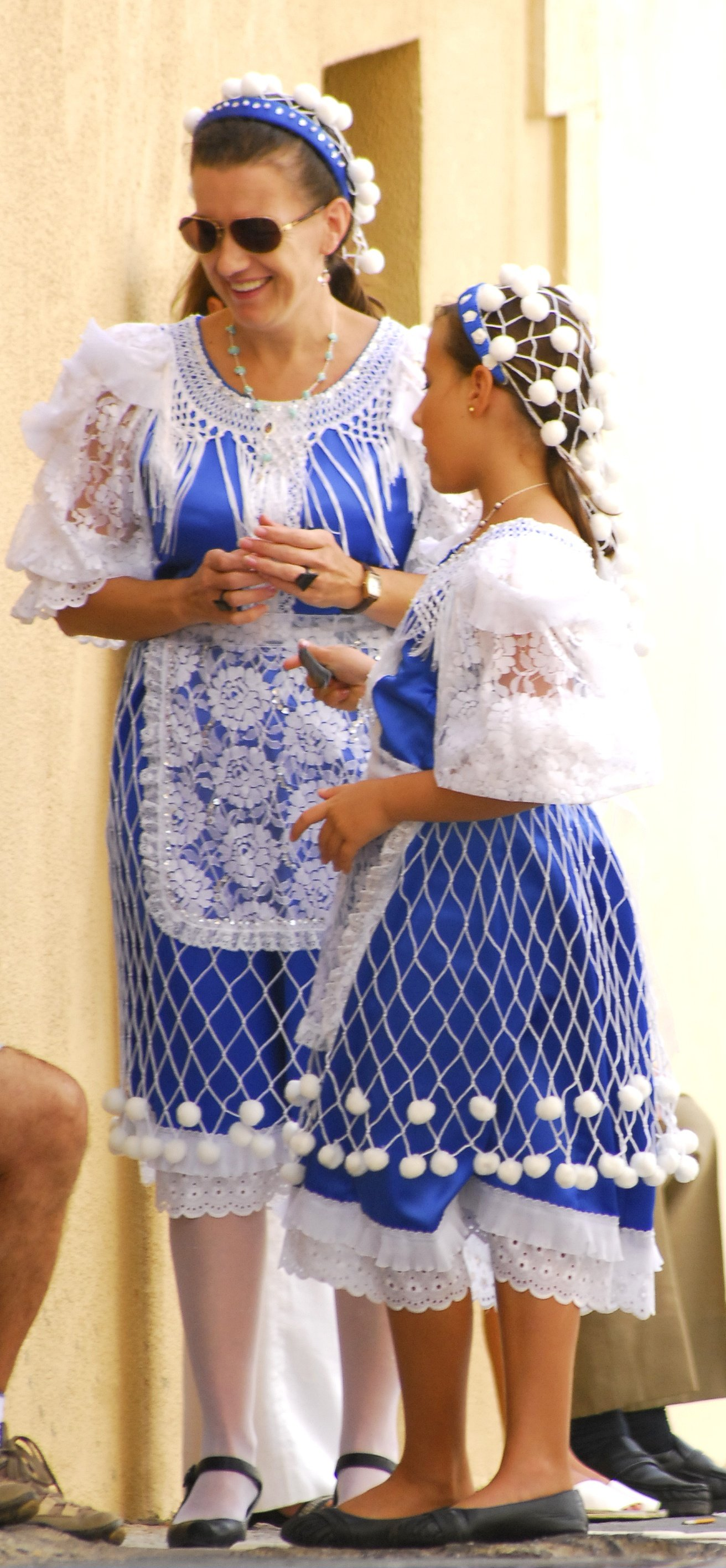 Traje típico de Melilla